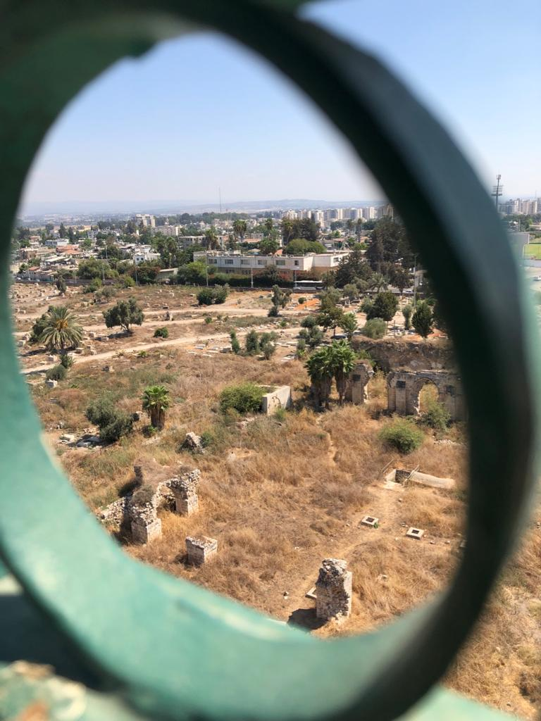 الجامع الابيض من الاعلى